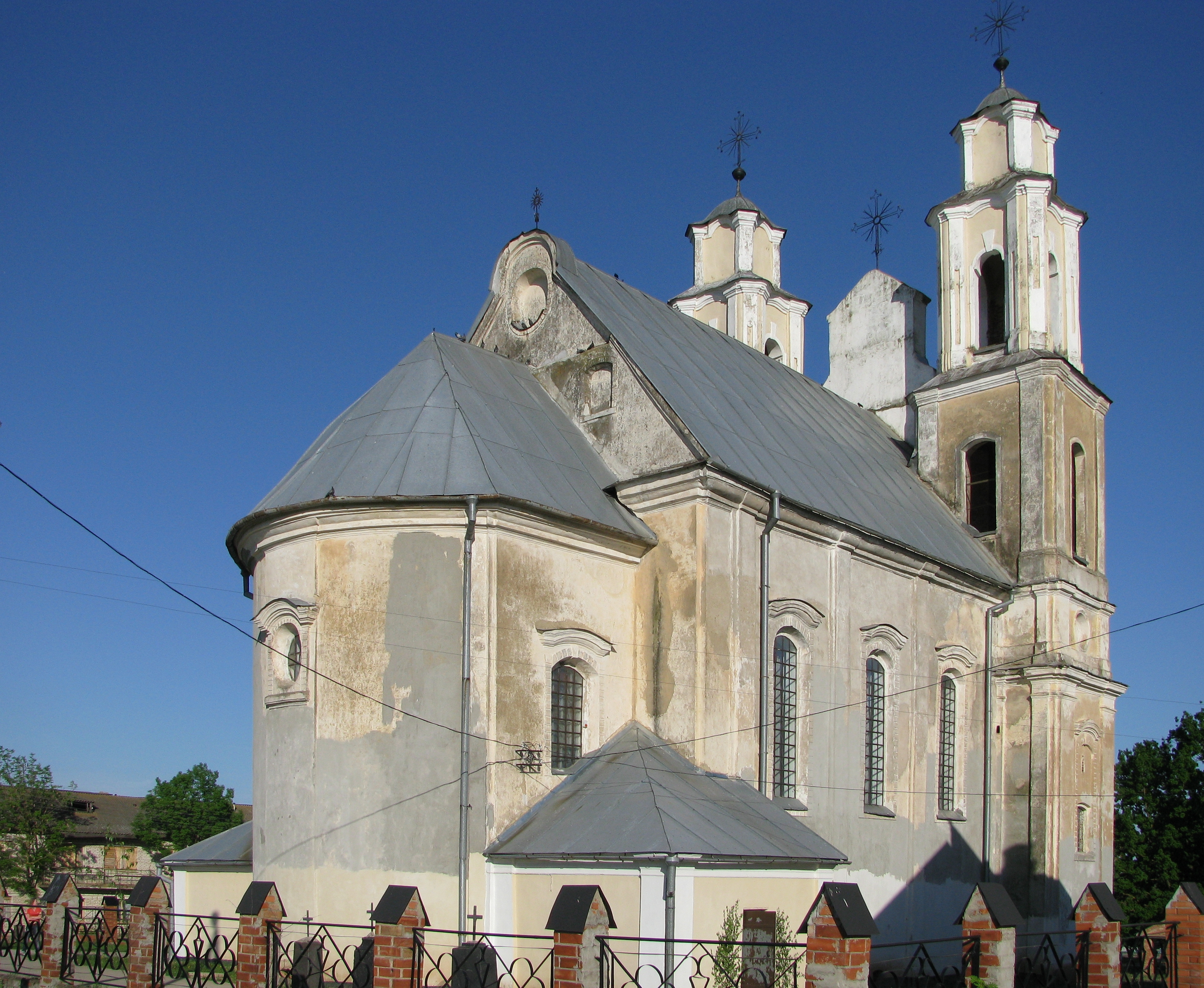 Беларуская (тарашкевіца): Благавешчанскі касьцёл. в. Германавічы This is a photo of Belarusian heritage monument. Reference number: 212Г000833 ( WLM)